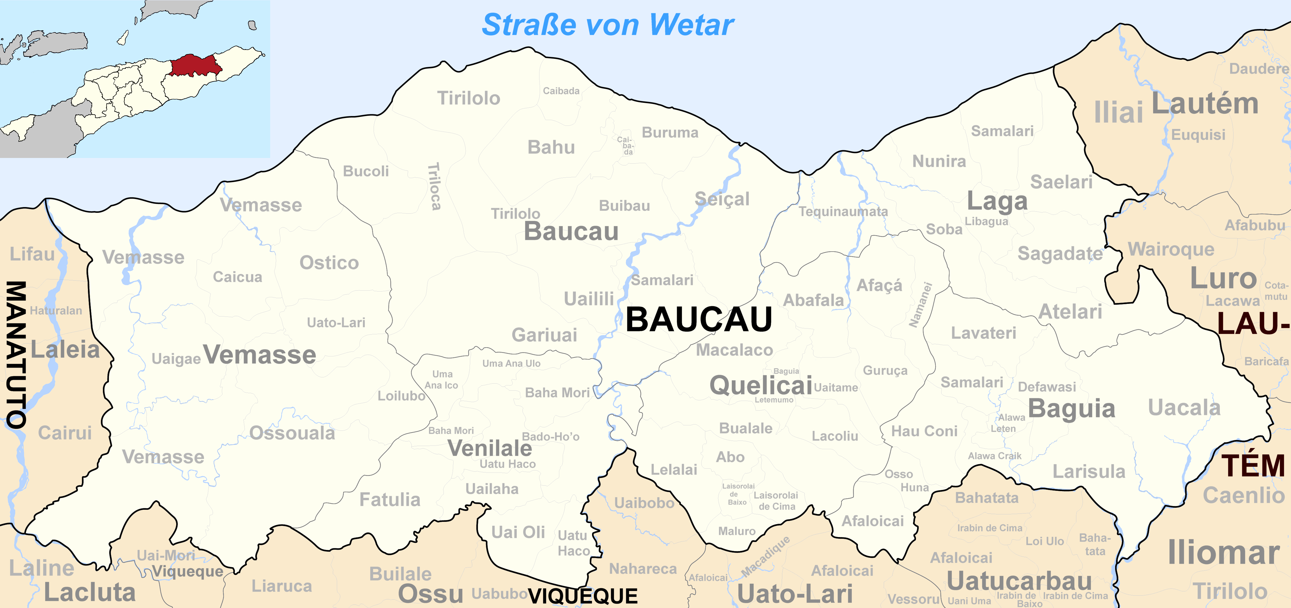 Verwaltungseinheiten der Gemeinde Baucau, Osttimor.